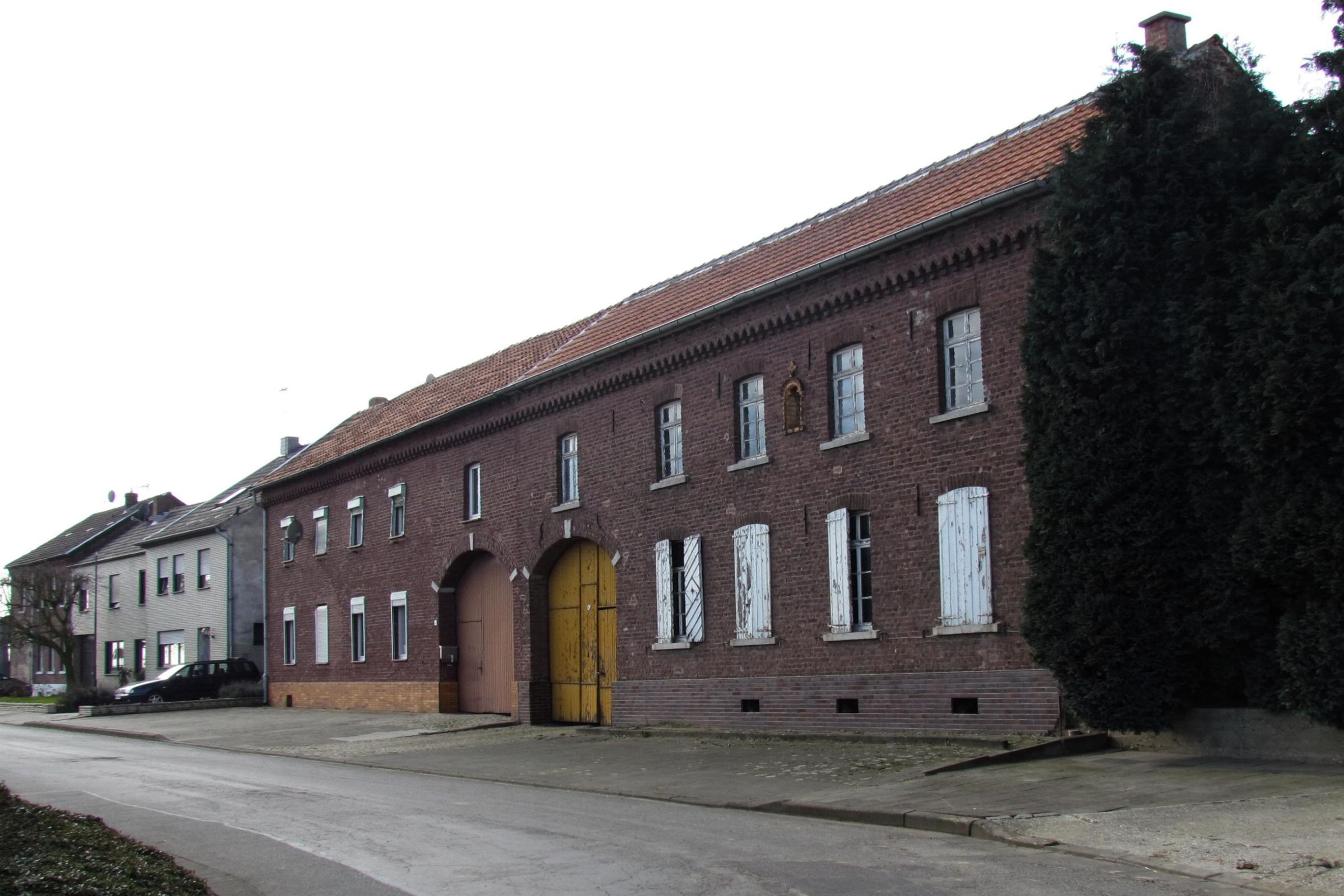 Ortsbebauung in Nachbarheid